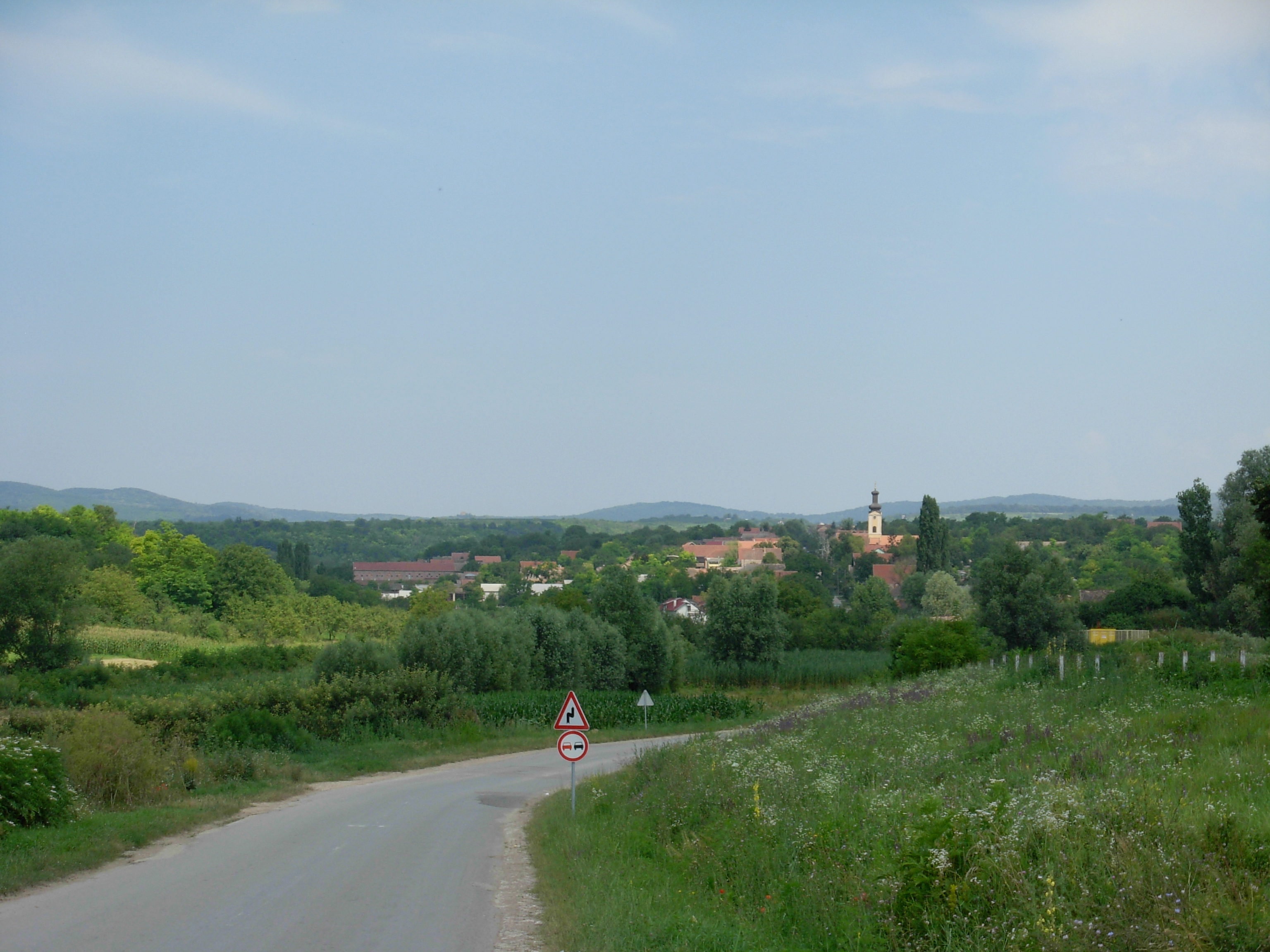 Pogled na selo Rivica, opština Irig.